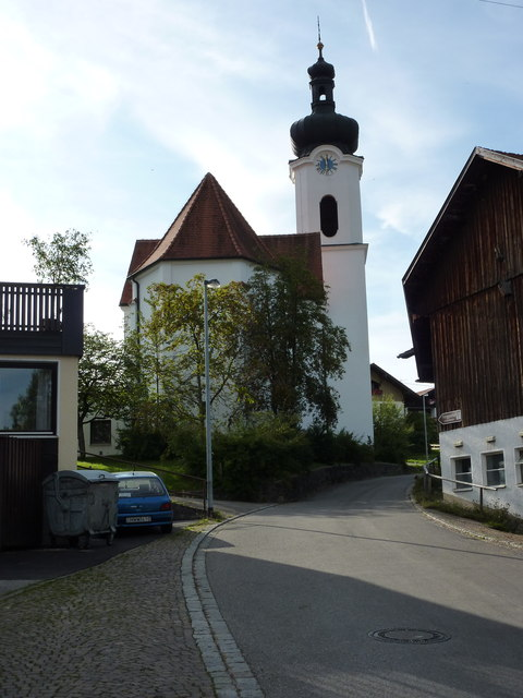 Rieden am Forggensee, kath. Pfarrkirche zu den hll. Fünf Wunden.